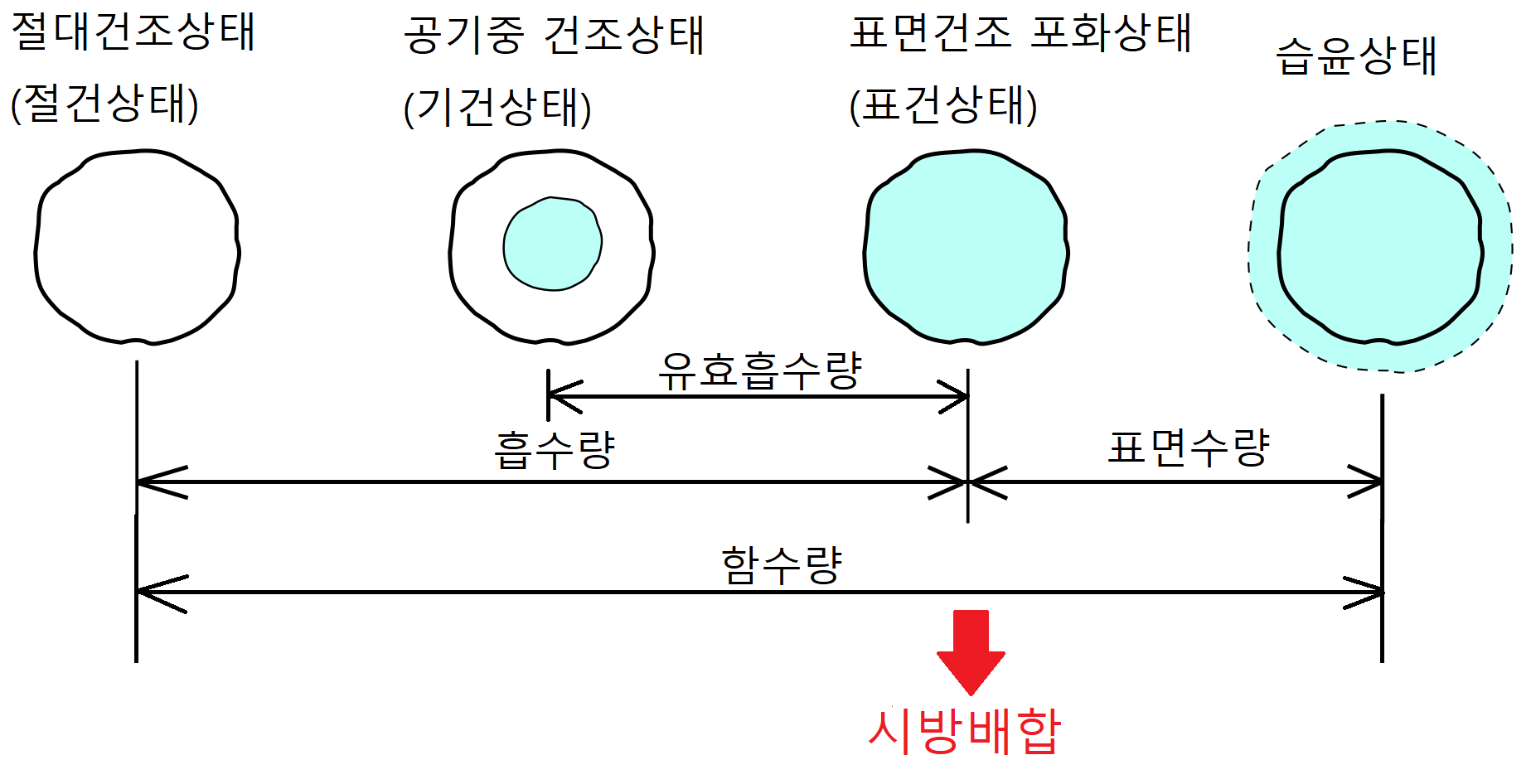 골재의 상태